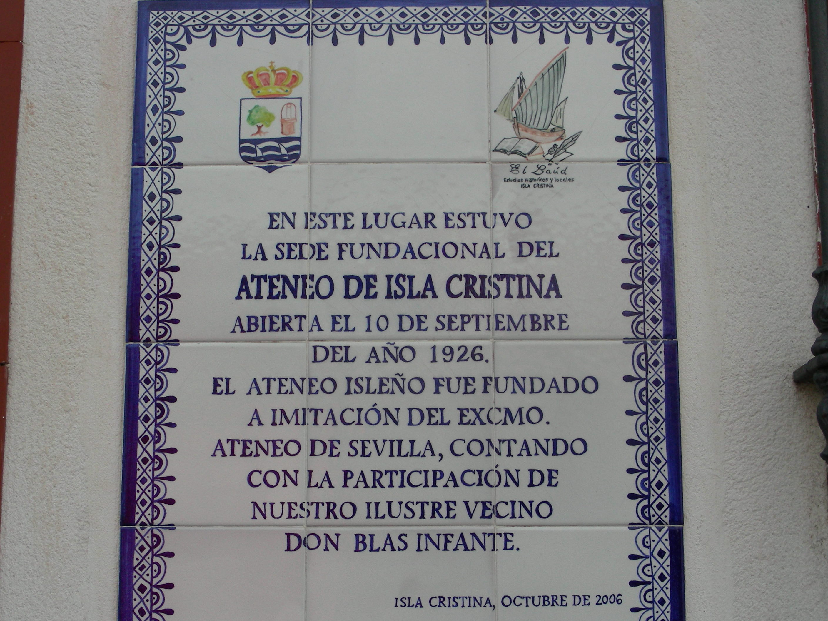 Placa del Ateneo de Isla Cristina